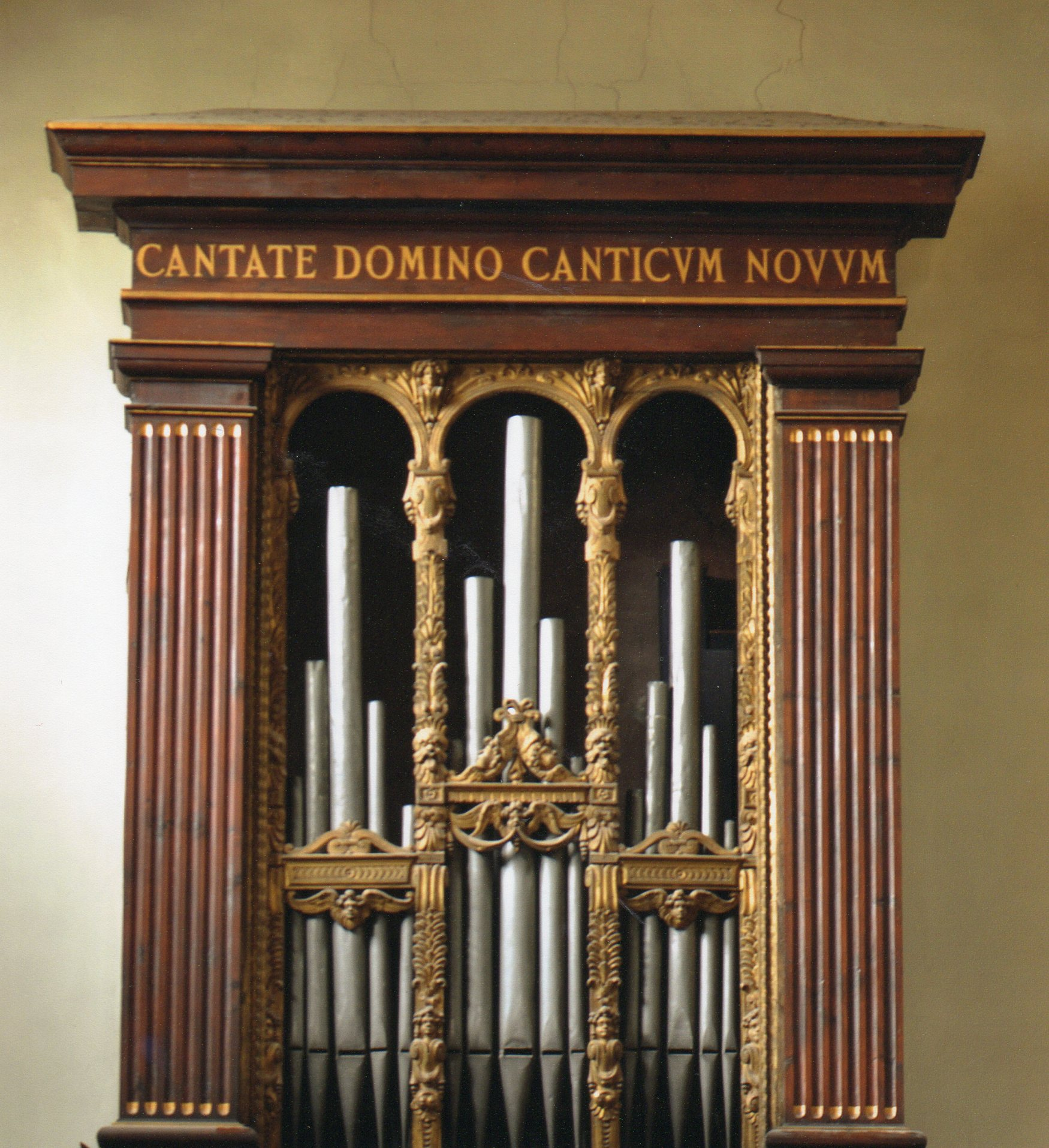 Organo della Badia a Ripoli a Firenze